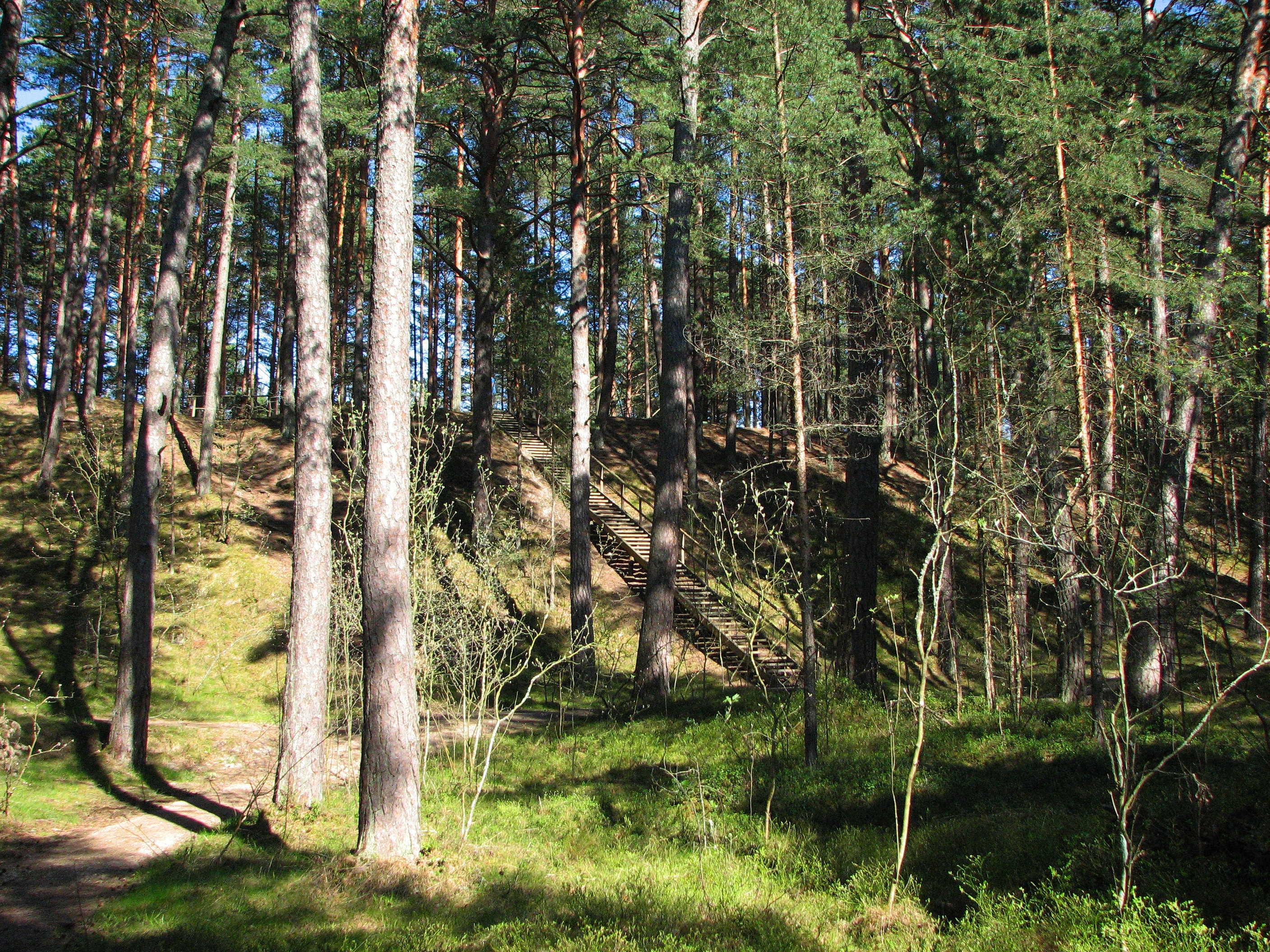 Jurmala_Ragakapa_01